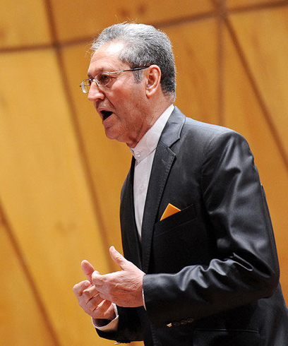 اجرای رشید وطن‌دوست به همراه کر ارکستر سمفونیک تهران تالار رودکی تهران ۳۰ بهمن ۱۳۹۴